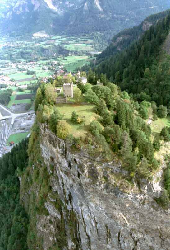 Flugaufnahme Burganlage Hohen Rätien